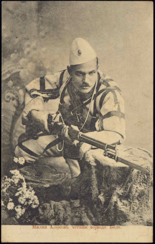 Milan Miša Aleksić-Marinko